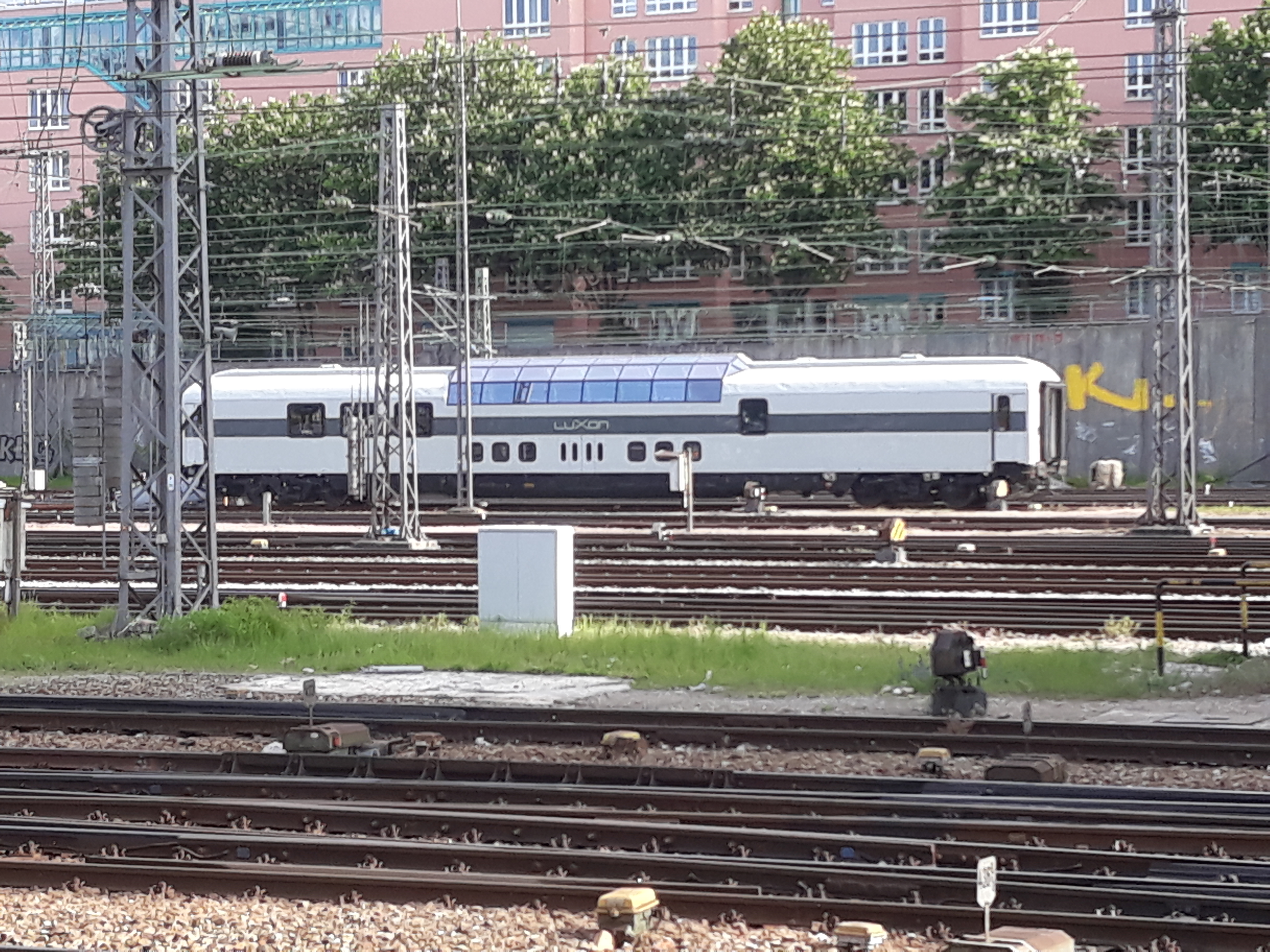 Aussichtswagen Luxon von RailAdventure, ein umgebauter AD4üm-62 mit der Seriennummer 10553